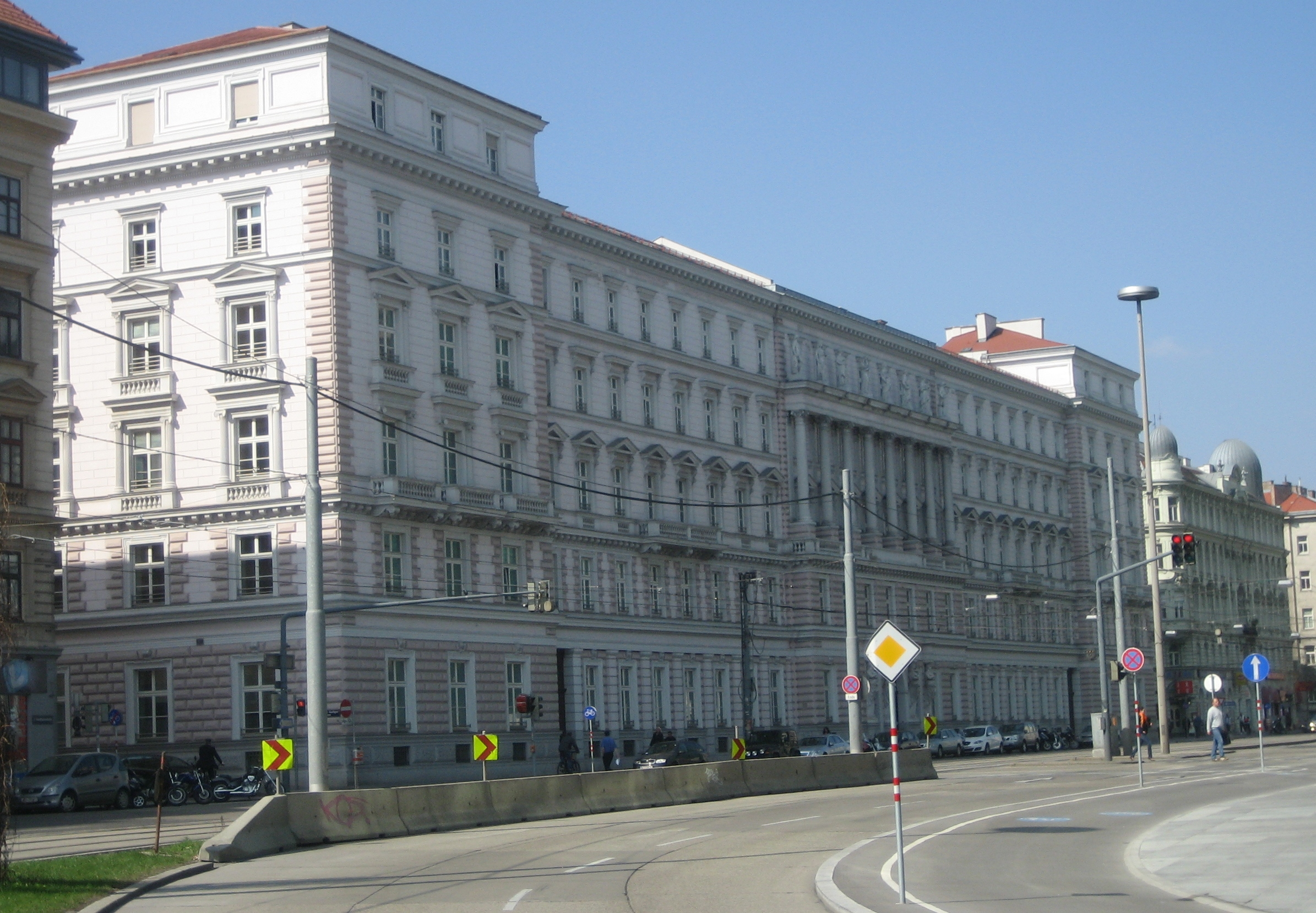 Das Haus Nordbahnstraße 50 in der Leopoldstadt, in Wien